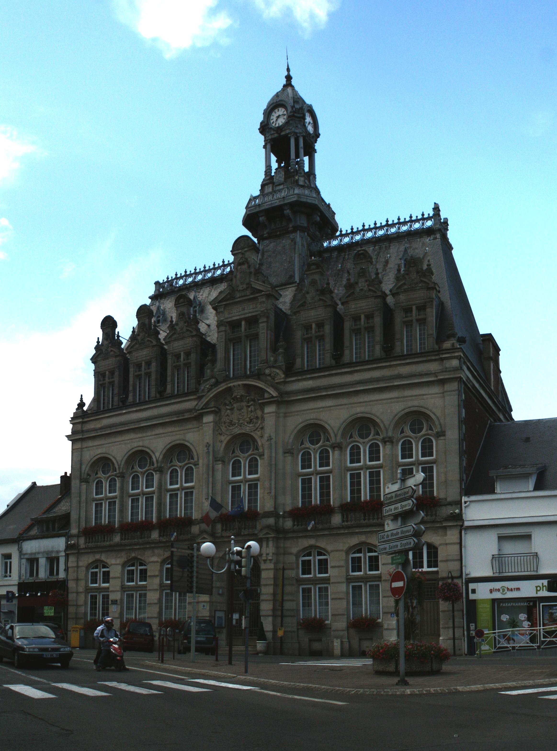 Hôtel de ville de Bohain-en-Vermandois, commune de l'Aisne, inauguré en 1884